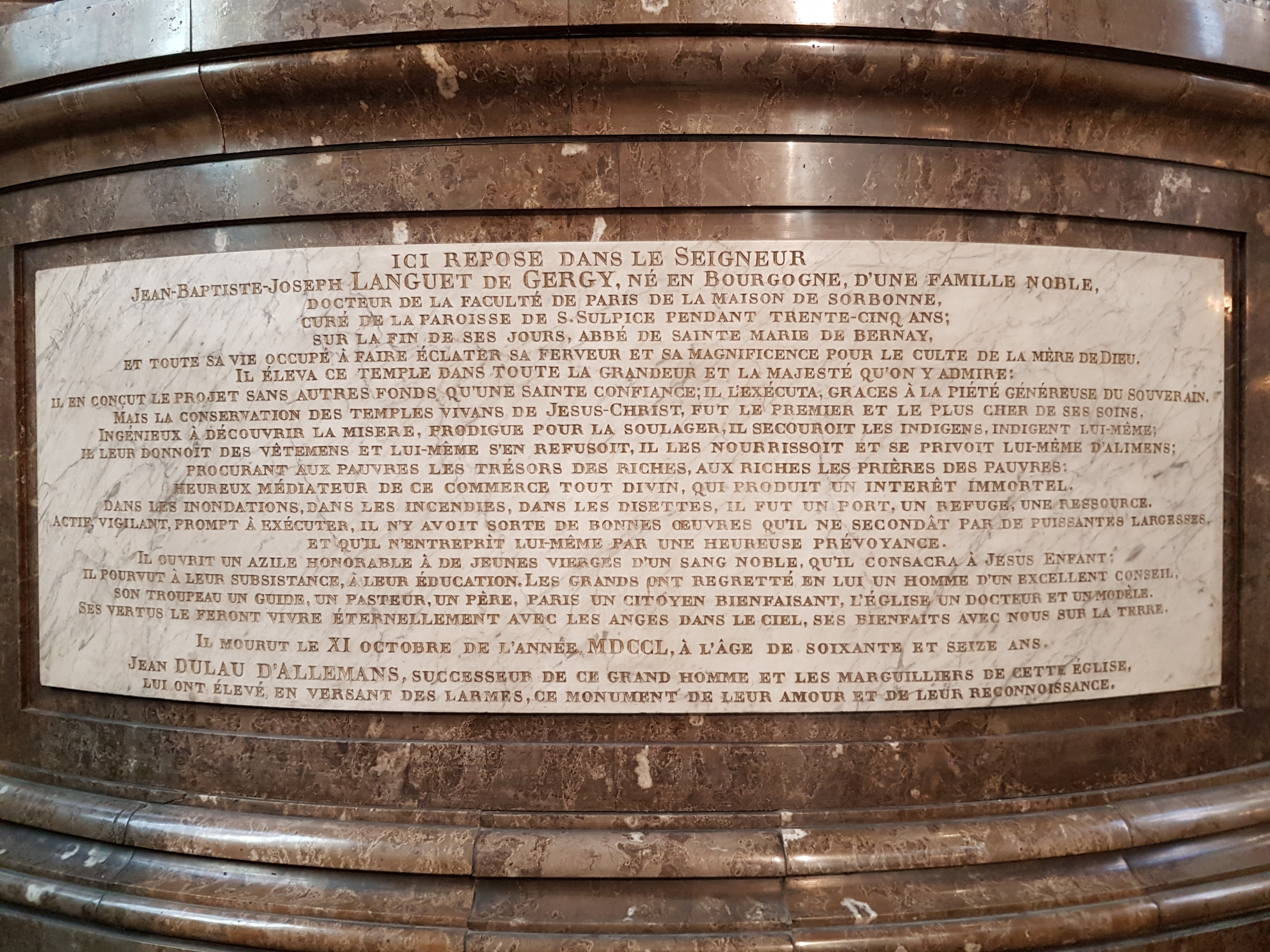 Plaque votive du monument à Jean-Baptiste Languet de Gergy.